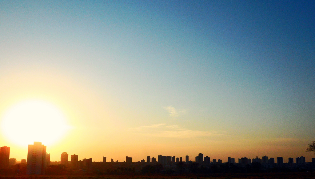 Skyline pôr do sol em Araçatuba a partir da Zona Leste.